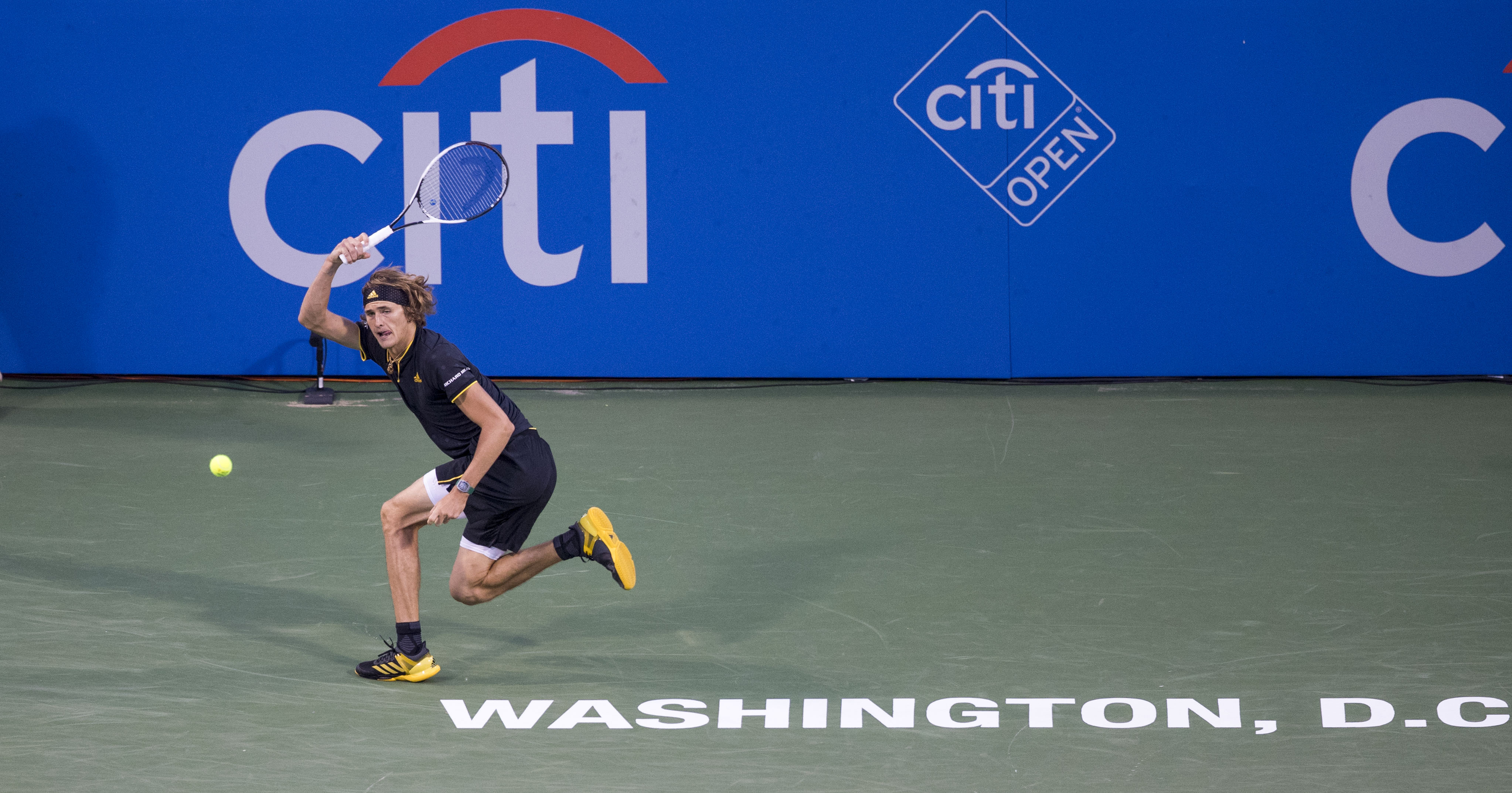 Citi Open Tennis 2017